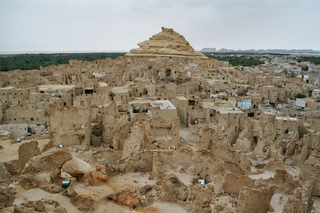 Oase Siwa / Ägypten. Übersicht alte Stadt